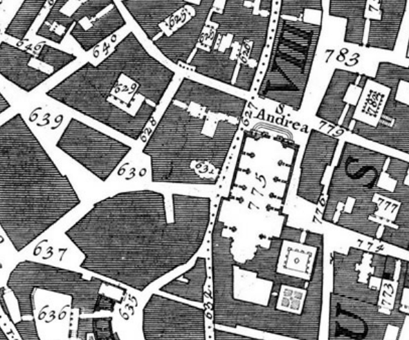 Pianta di Nolli